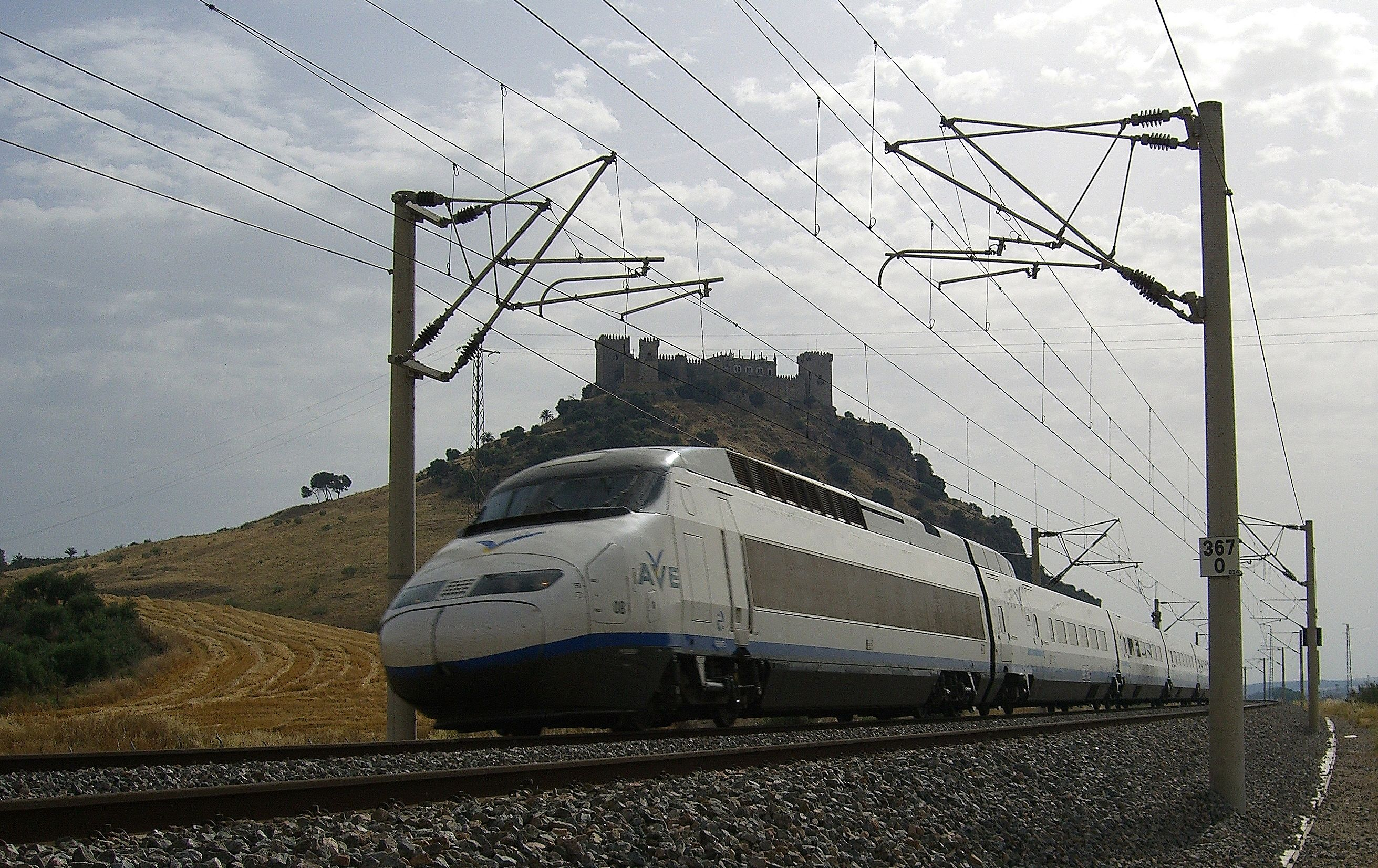 AVE serie 100